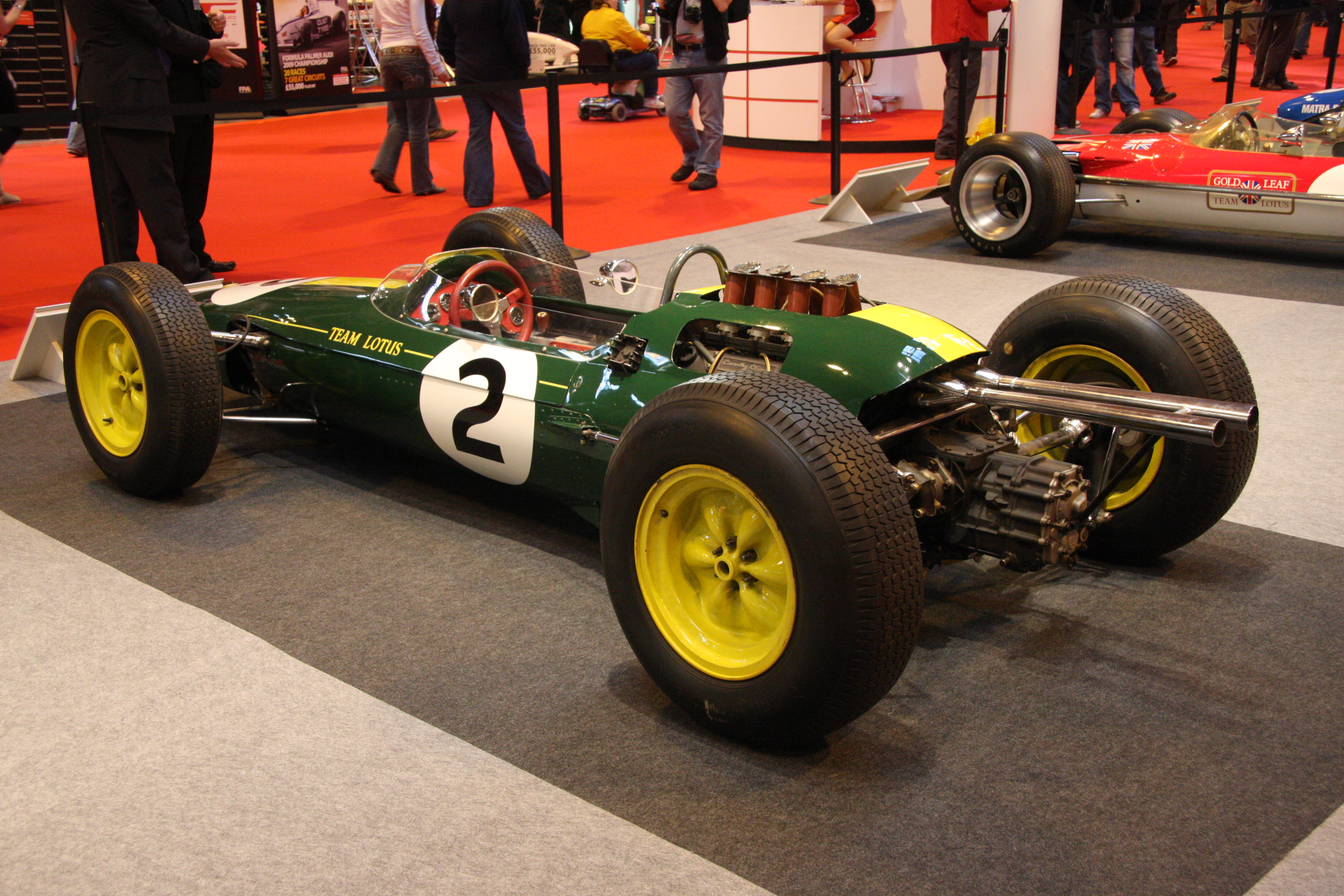 1962 Lotus 25 Climax